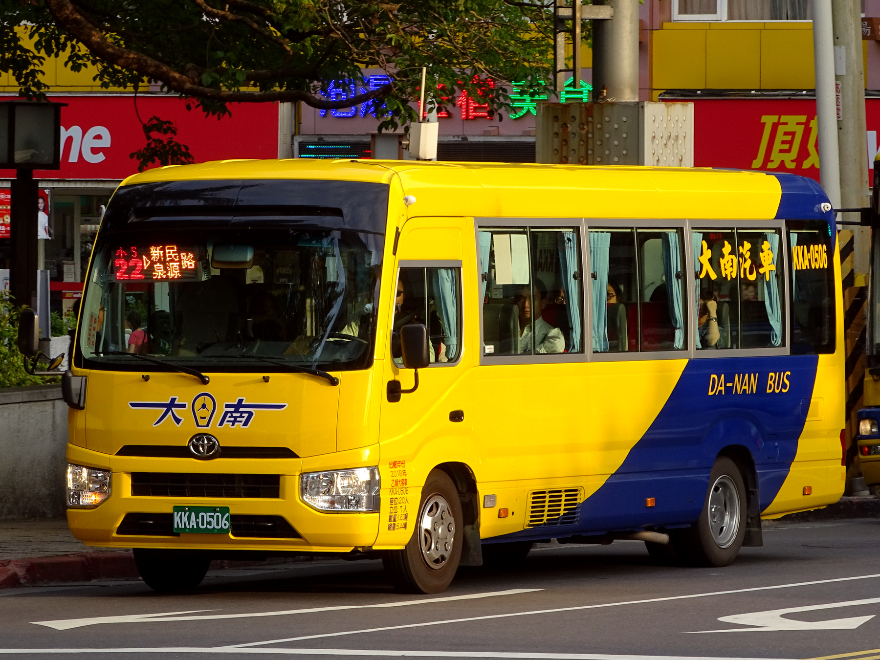 中文（台灣）: 大南汽車2018年豐田Coaster中型巴士KKA-0506，行駛臺北市聯營公車小22線。